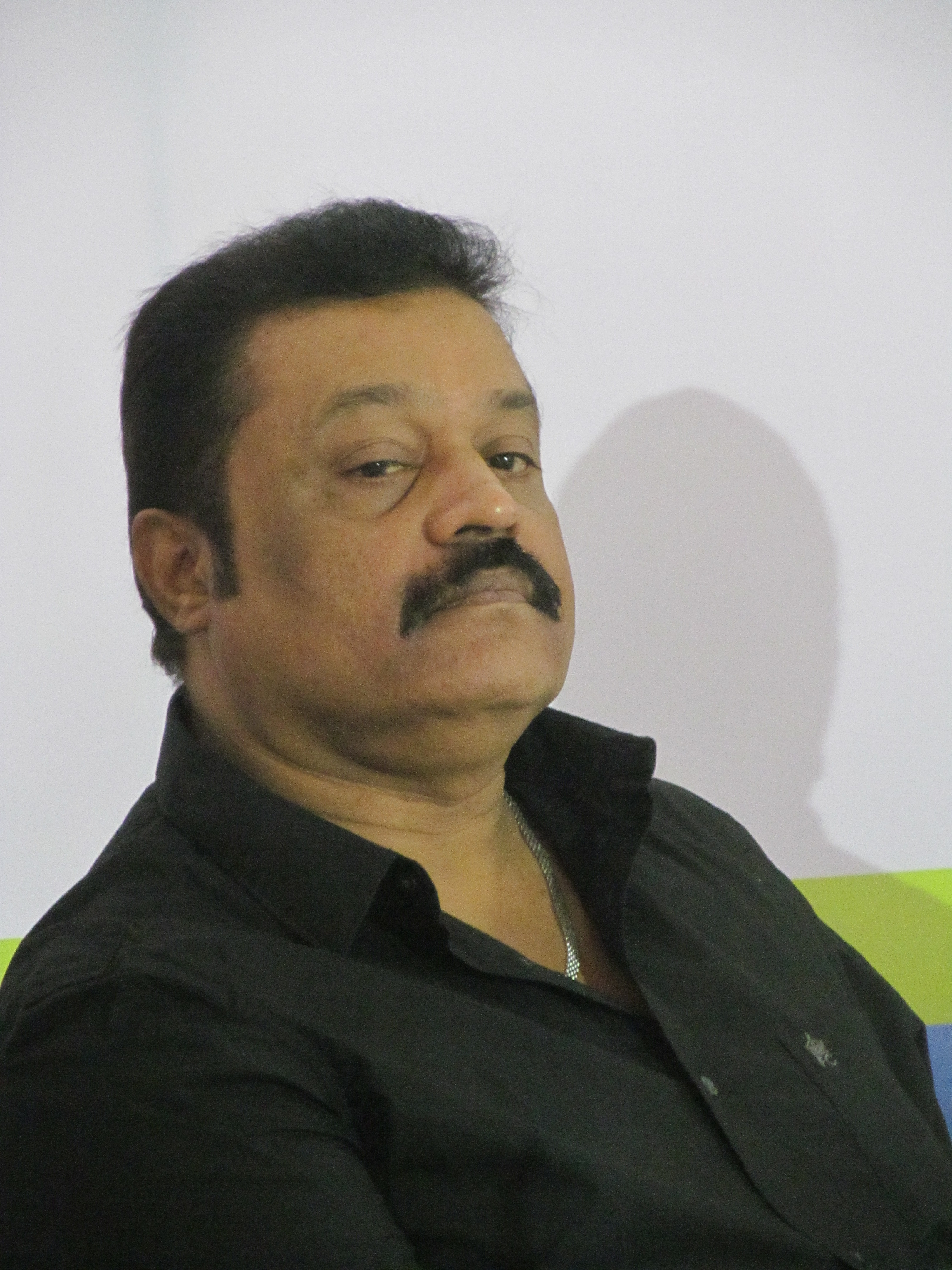 സുരേഷ് ഗോപി മലയാളസിനിമാനടനും രാഷ്ട്രീയപ്രവര്‍ത്തകനും. 2014ല്‍ കൊല്ലത്തു നടന്ന ഒരു പരിപാടിയില്‍ പങ്കെടുക്കുന്നു.